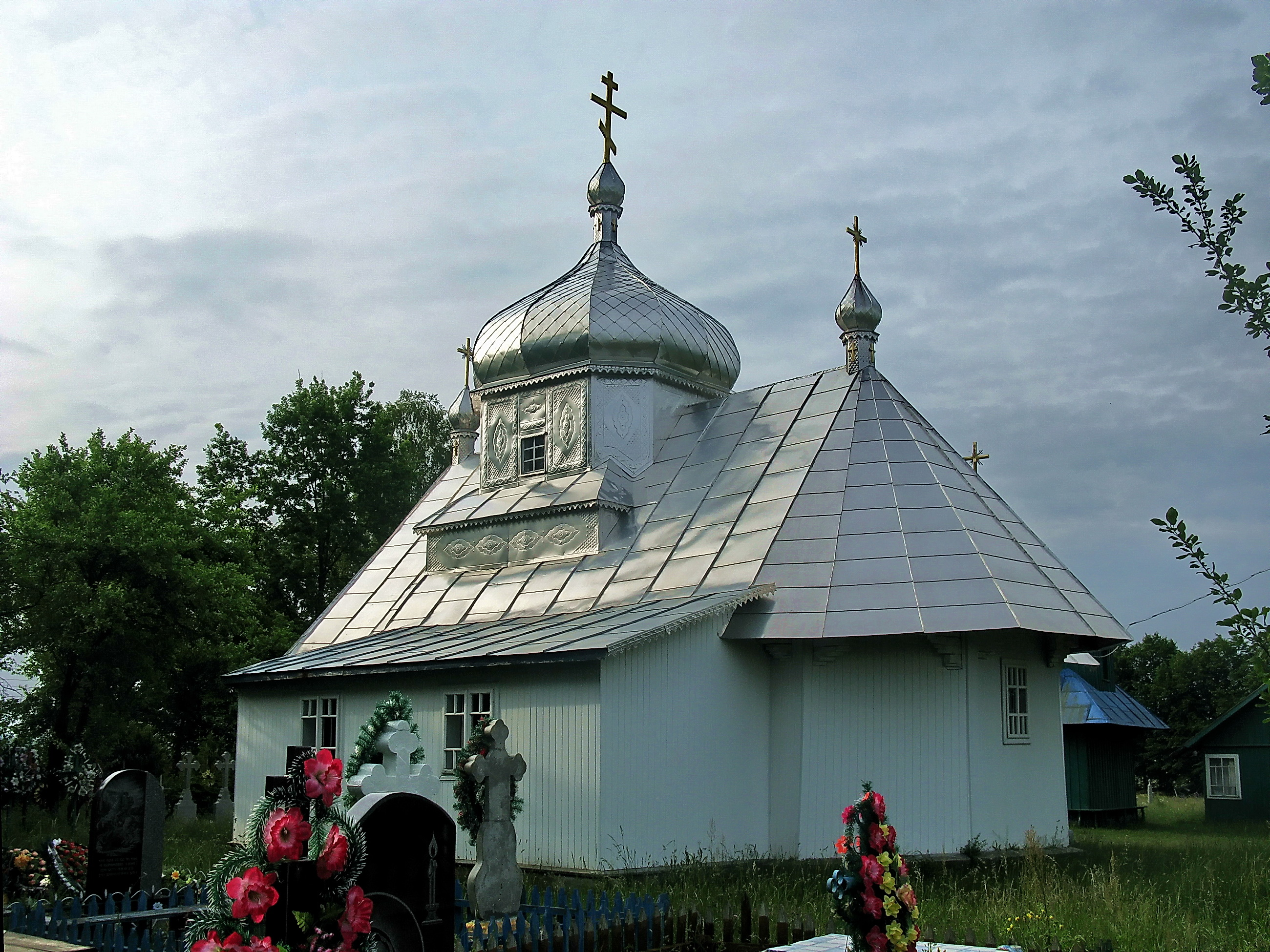 Biserica „Cuvioasa Paraschiva” din Davideni, raionul Storojineț, regiunea Cernăuți, Ucraina